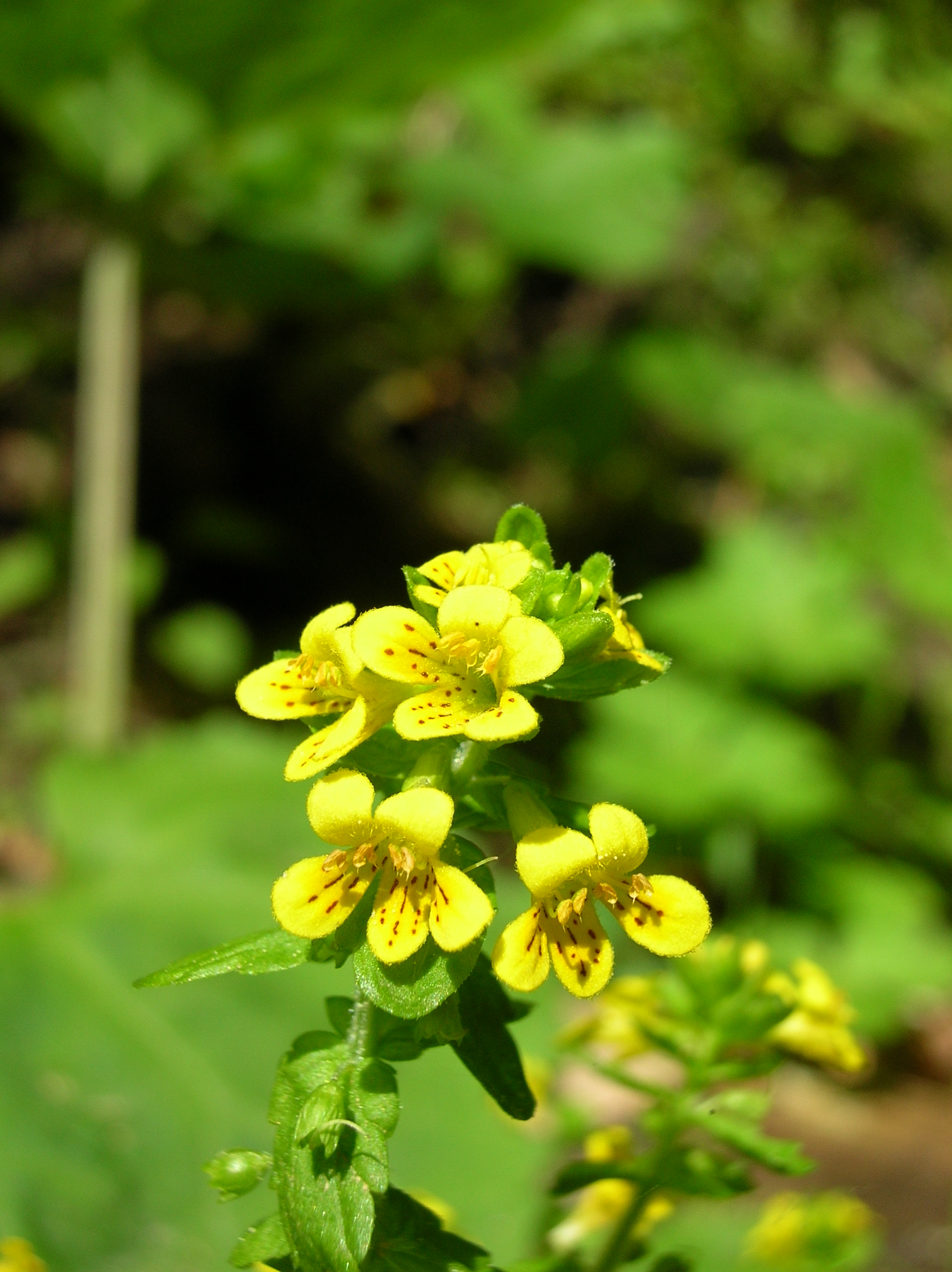 Federica Bardi, scatto personale, Tozzia alpina L. subsp. alpina, caricata da utente lineagoticafight autorizzato dall'autrice